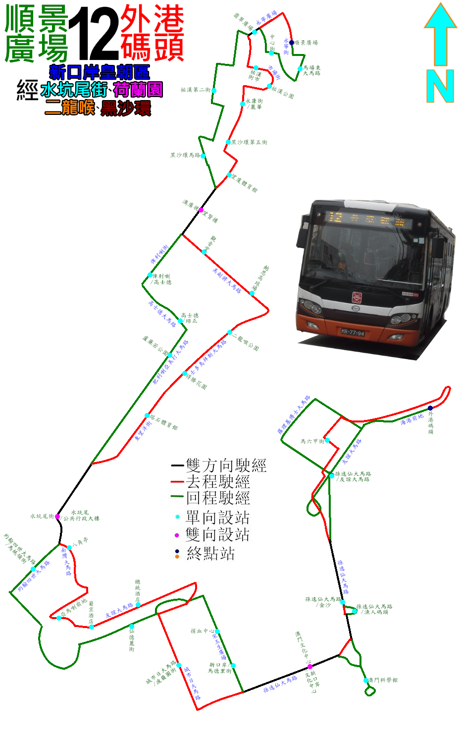 中文（香港）: 澳門巴士12路公車的走線圖